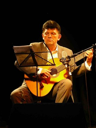 Witold Smorawiński